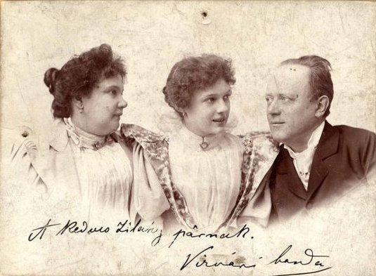 Vízváriné Szigeti Jolán, Vízváry Mariska, Vízvári Gyula. A képes oldalon: "A kedves Zilahy párnak. Vízvári banda".